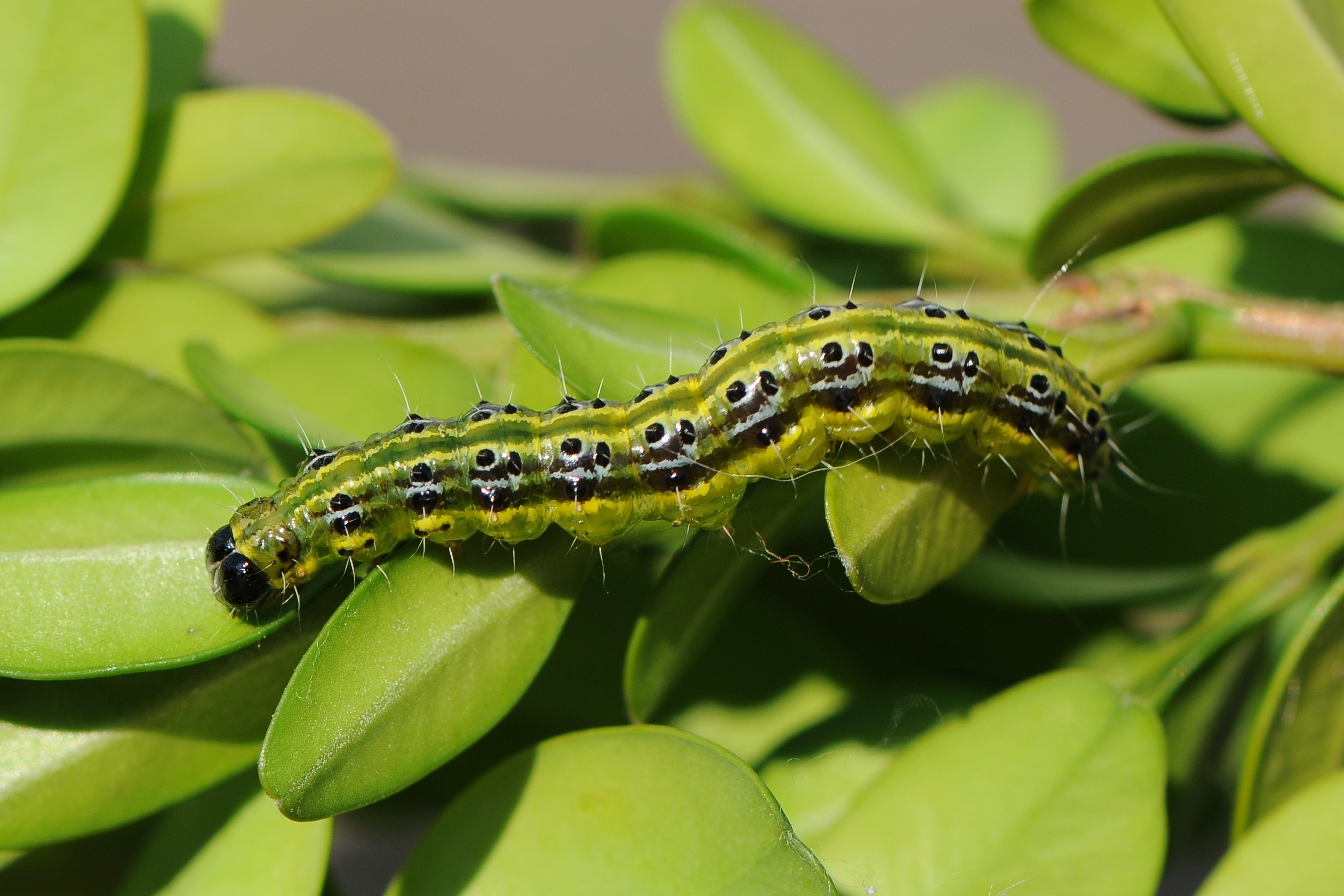 Raupe des Buchsbaumzünsler. Der Buchsbaumzünsler (Cydalima perspectalis) ist ein ostasiatischer Kleinschmetterling aus der Familie der Crambidae, der zu Beginn des 21. Jahrhunderts nach Mitteleuropa eingeschleppt wurde. *** Gesehen in Dornbirn.